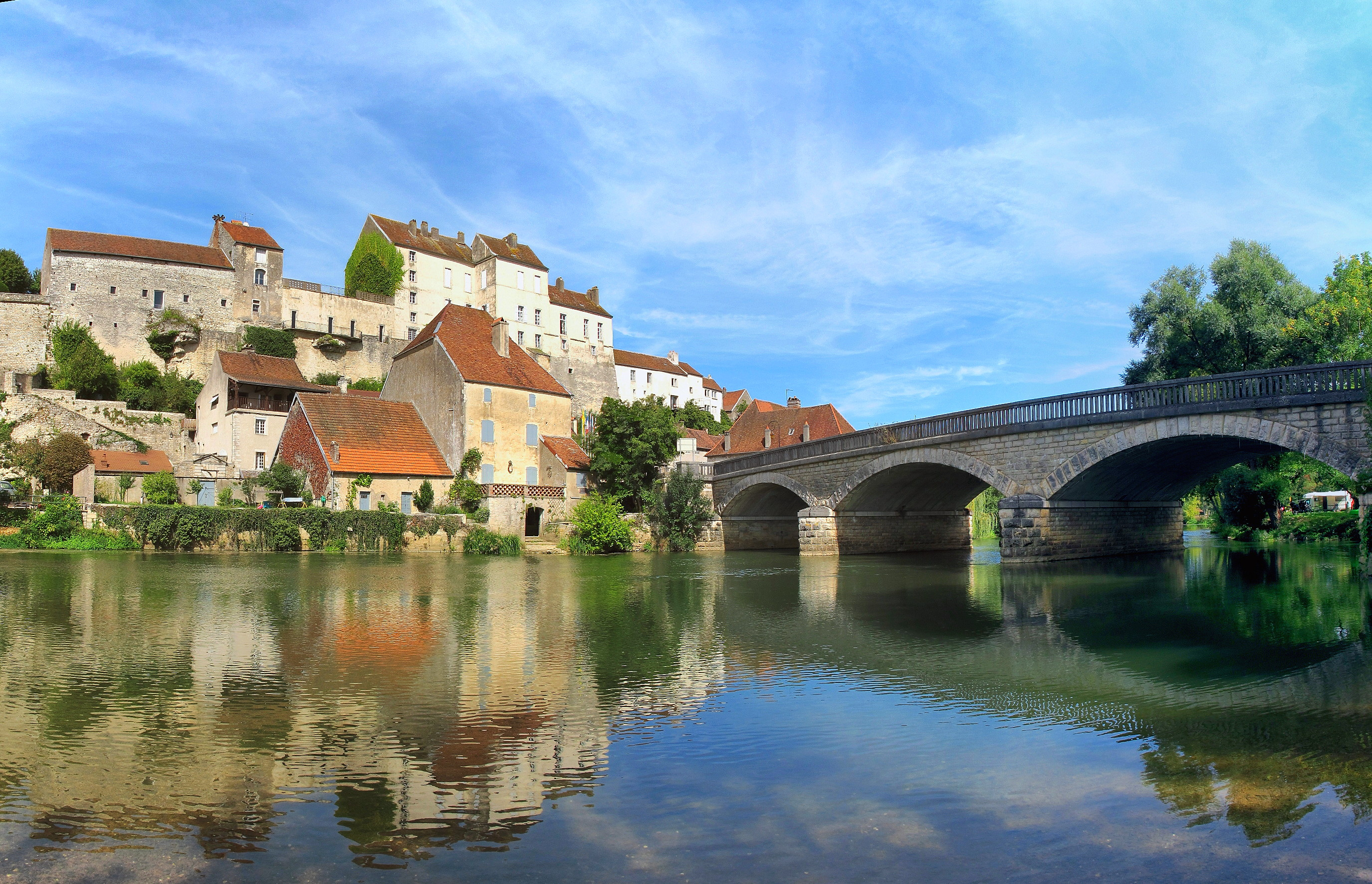 Pesmes, le château et le pont.